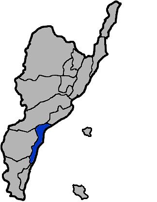 本圖係小籃子為編輯臺灣省臺東縣太麻里鄉所改繪，感謝KJ提供原圖。